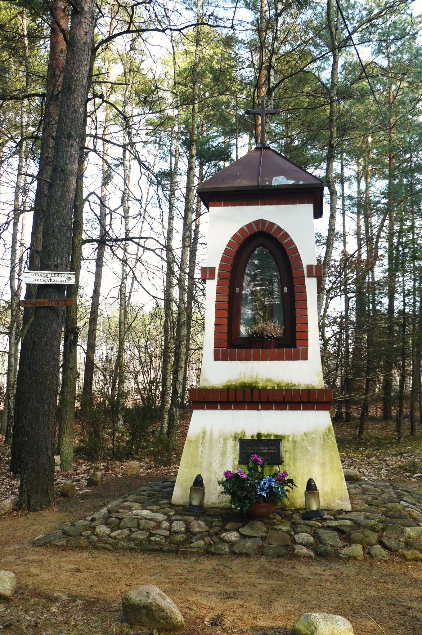 Kapliczka pamięci Zenona Klafkowskiego w okolicy Bucharzewa - Puszcza Notecka.